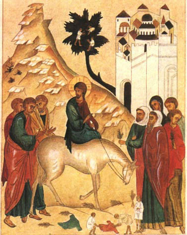 De intocht van Jezus in Jeruzalem, Russische icoon]